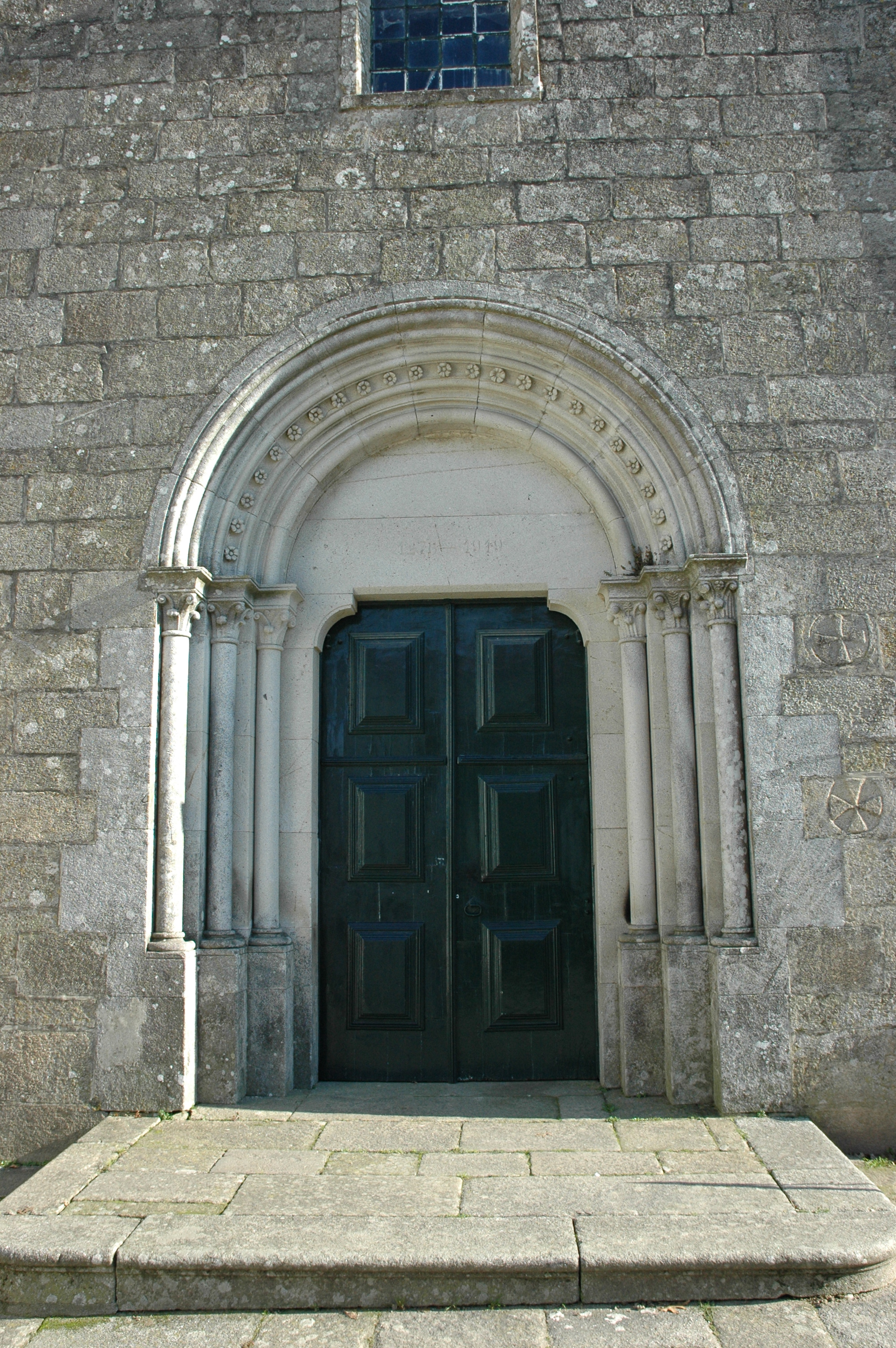 Valença do Minho - Santa Maria dos Anjos